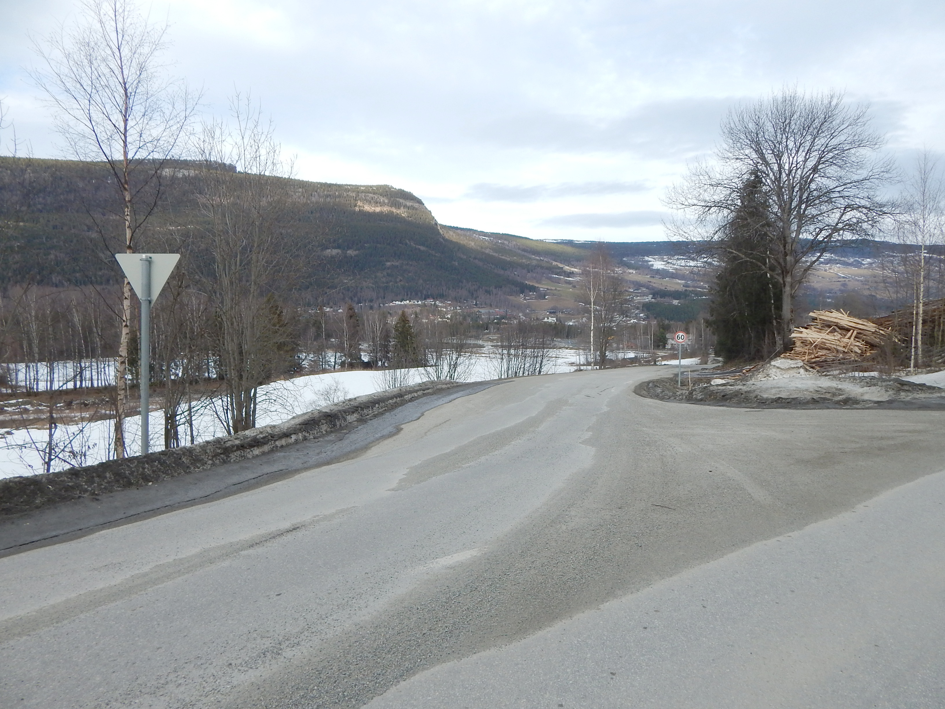 Gålåvegen (fylkesvei 401) ved krysset med primær fylkesvei 256 vest for Lågen